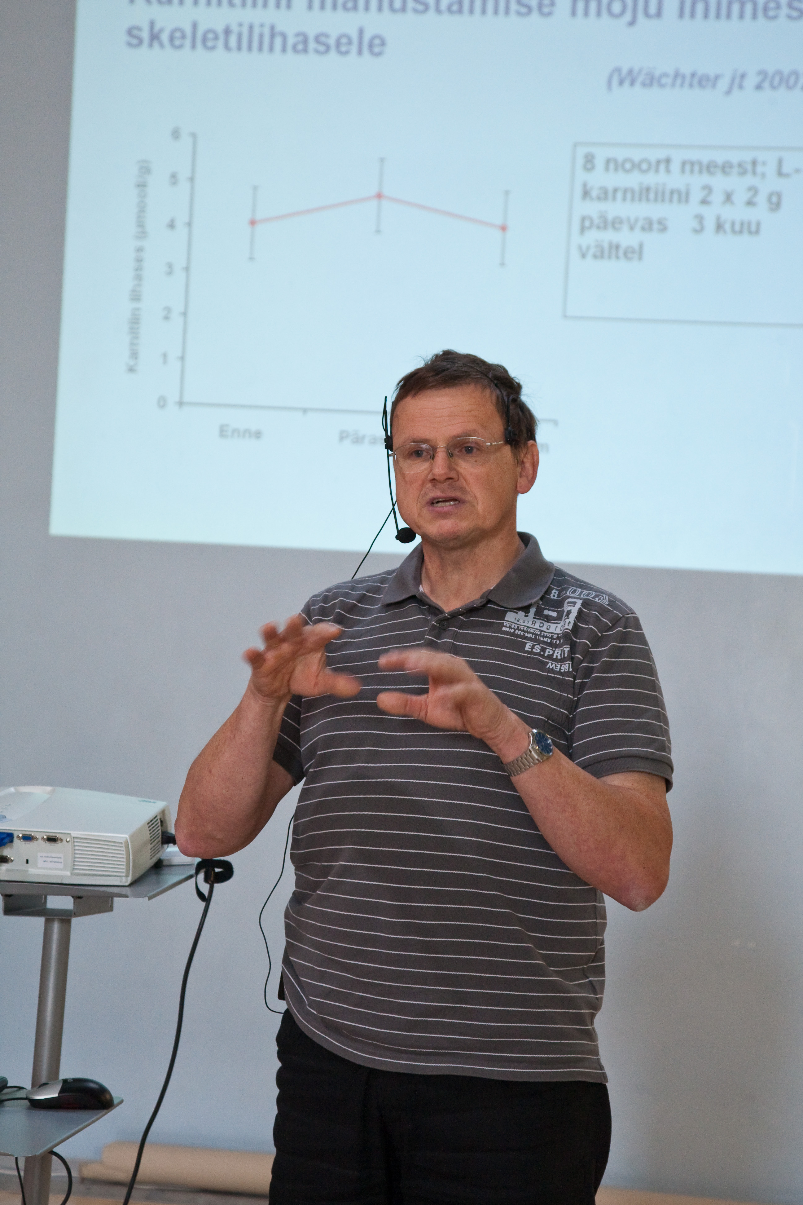 TÜ professor Vahur Ööpik lugemas loengut tervislikust toitumisest ja harrastusspordist. Tartu Ülikooli tudengite ja töötajate spordipäev TÜ spordihoones 17. septembril 2009.